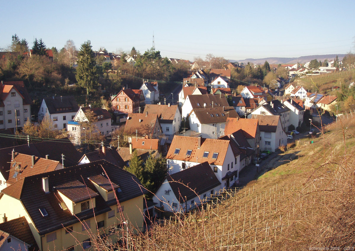 Blick von Osten über den Altort von Heilbronn-Klingenberg